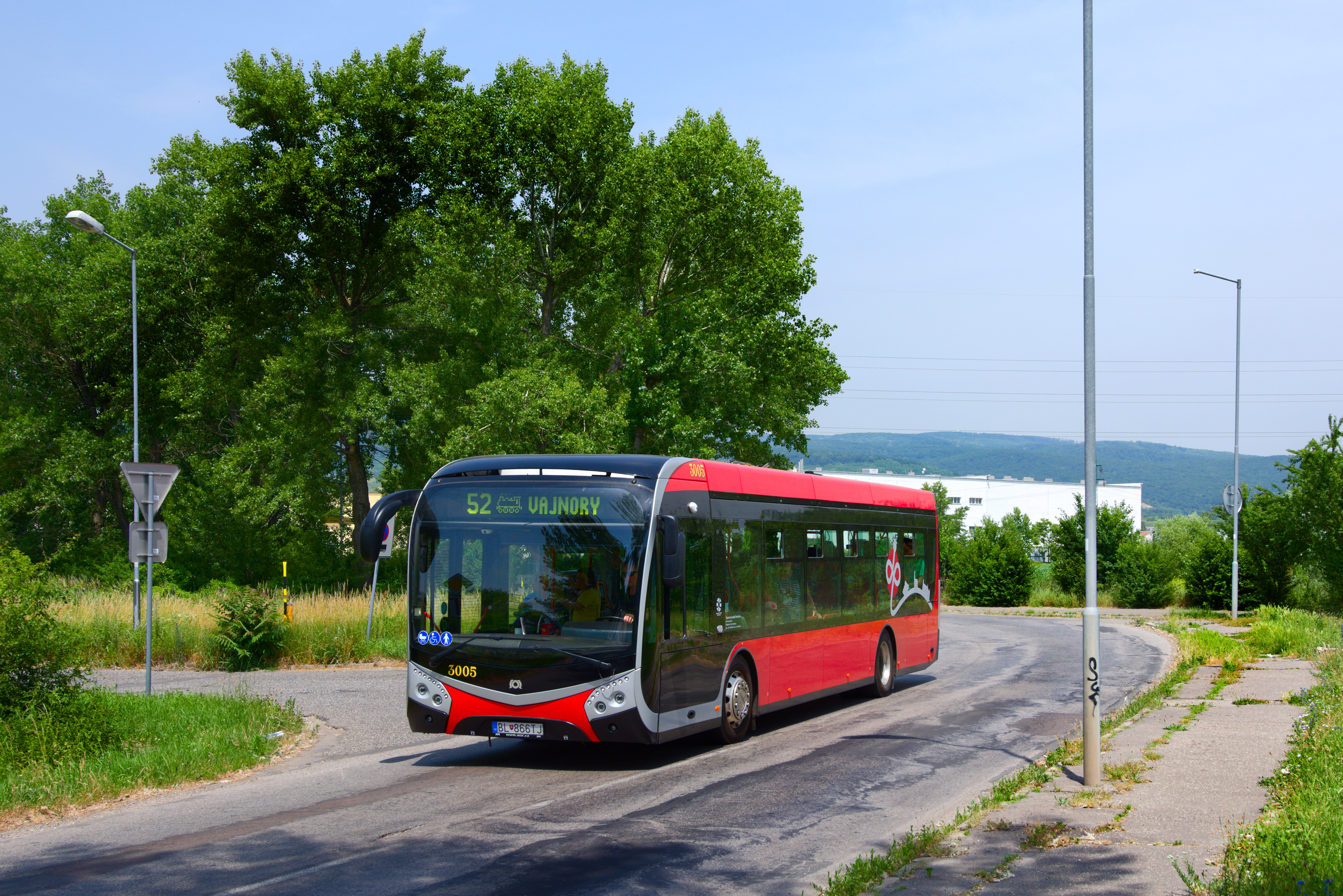 SOR NS 12 Electric Nr. 3005 als Linie 52 bei der Hst. Sklabinská.